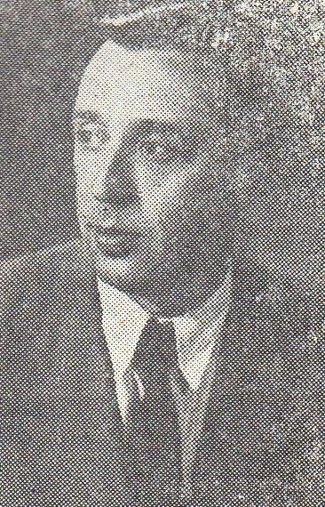 Władysław Węgorek - entomolog polski.